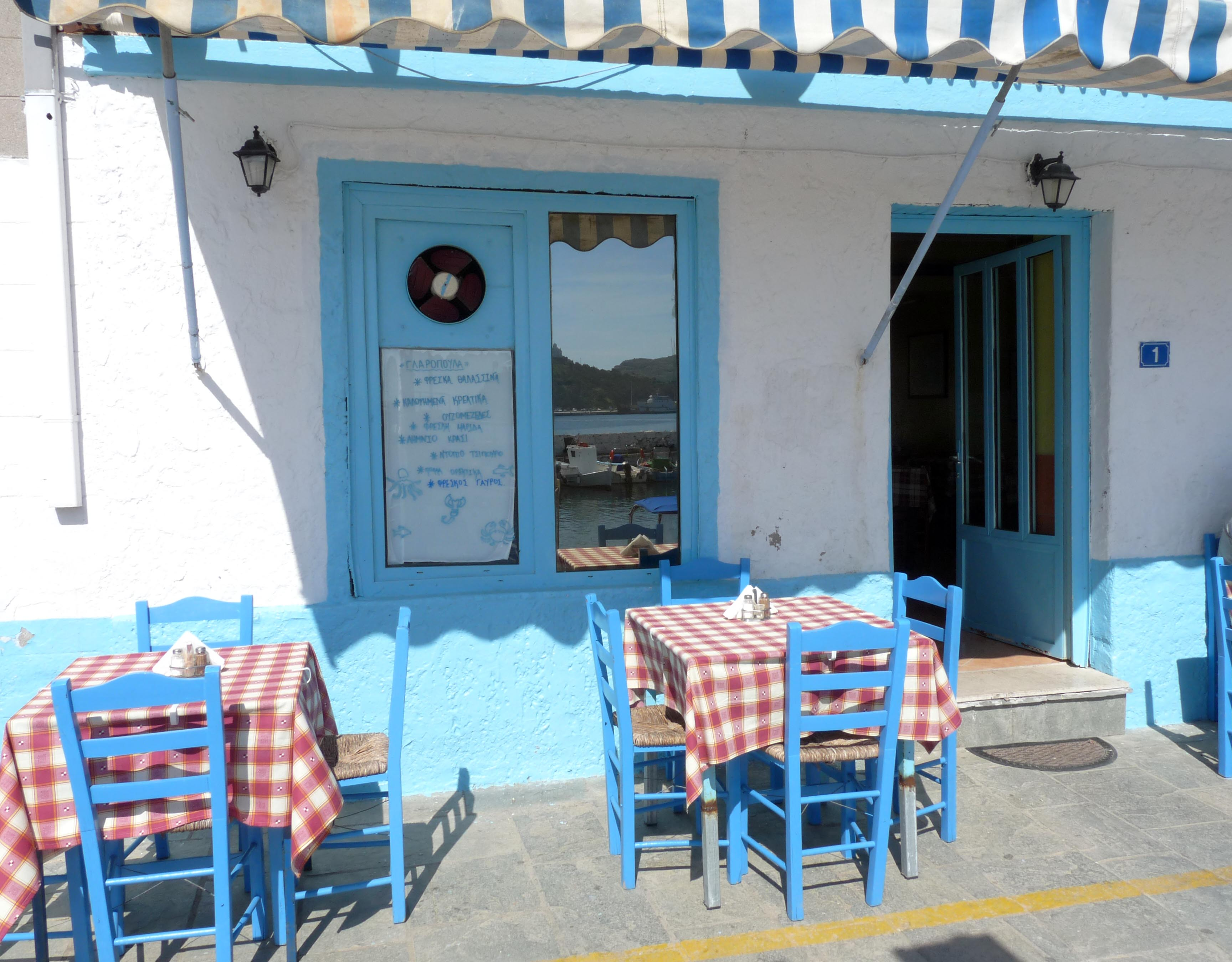 Lemnos Tavrena 01